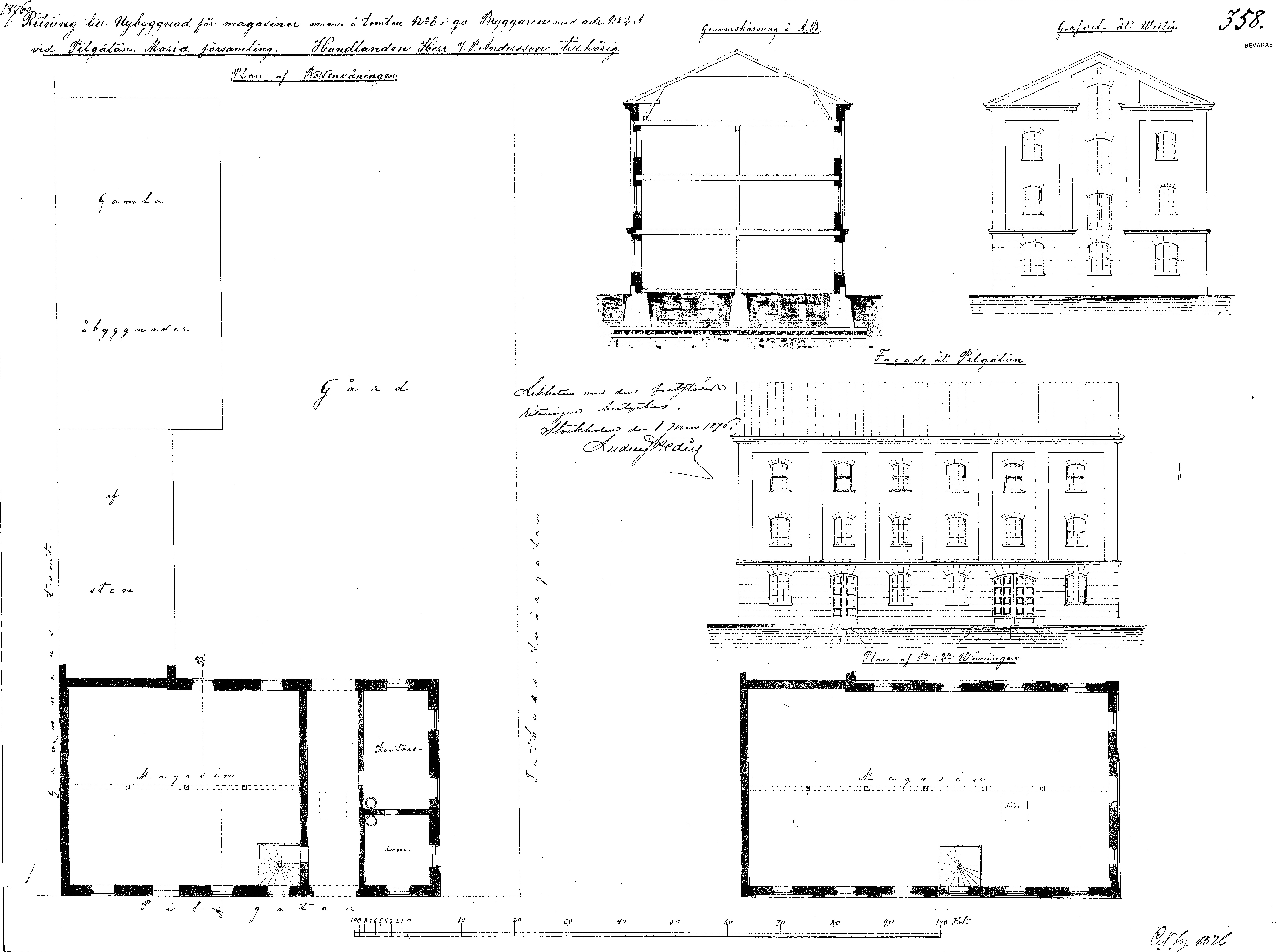 Bryggaren nr 8, Södermalm, Stockholm. Ritning till nybyggnad för magasin m.m. å tomten i qv Bryggaren med adr. no 2A vid Pilgatan, Maria församling. Handlaren Herr J P Andersson tillhörig.